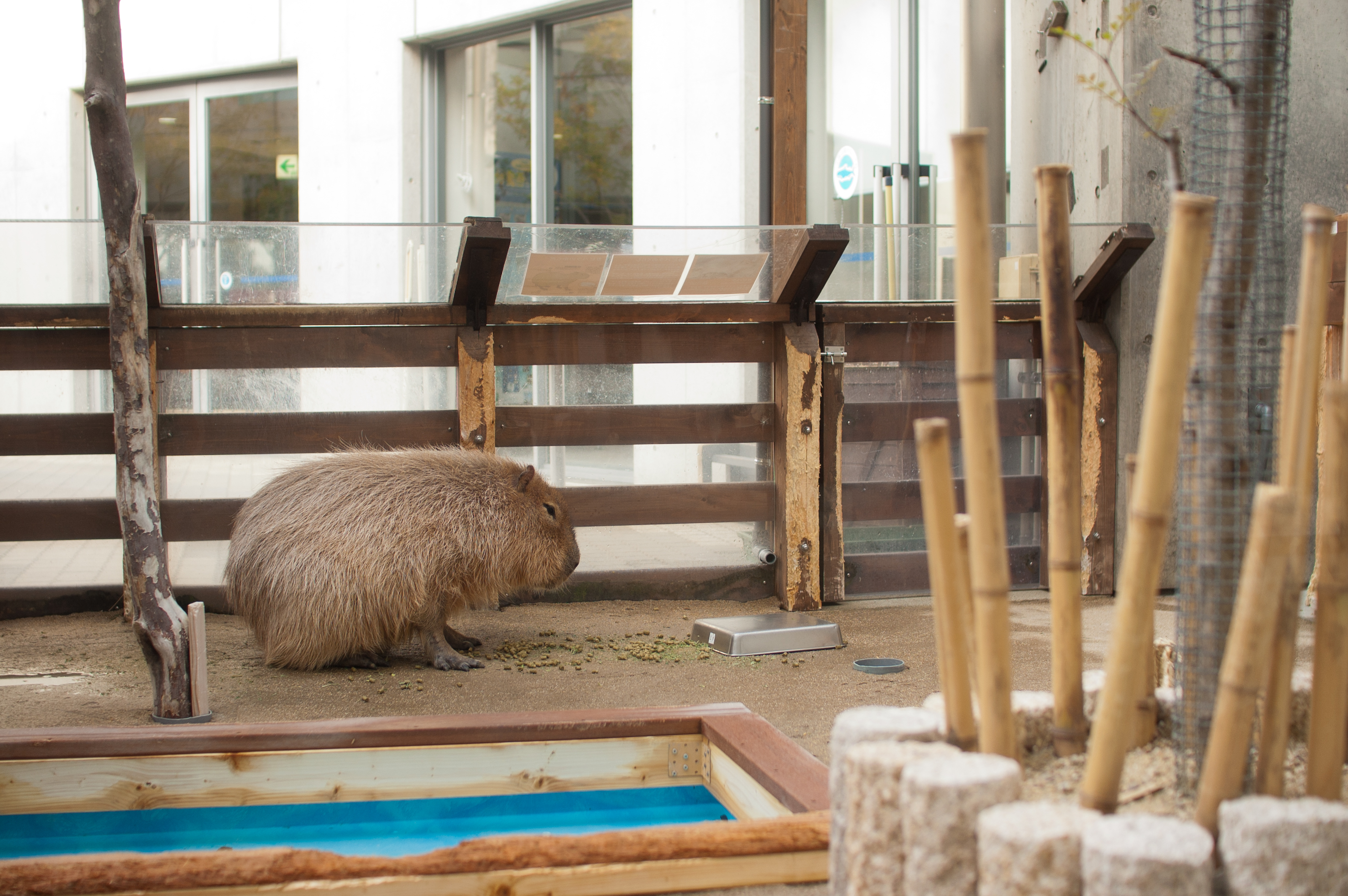 アクアととぎふでのカピバラ展示。